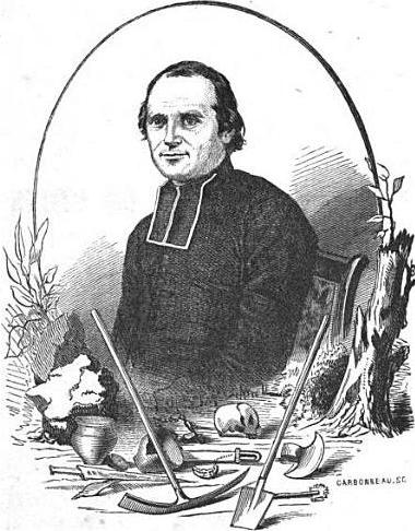 "L'abbé Cochet, Inspecteur des Monuments historiques et religieux de la Seine-Inférieure".